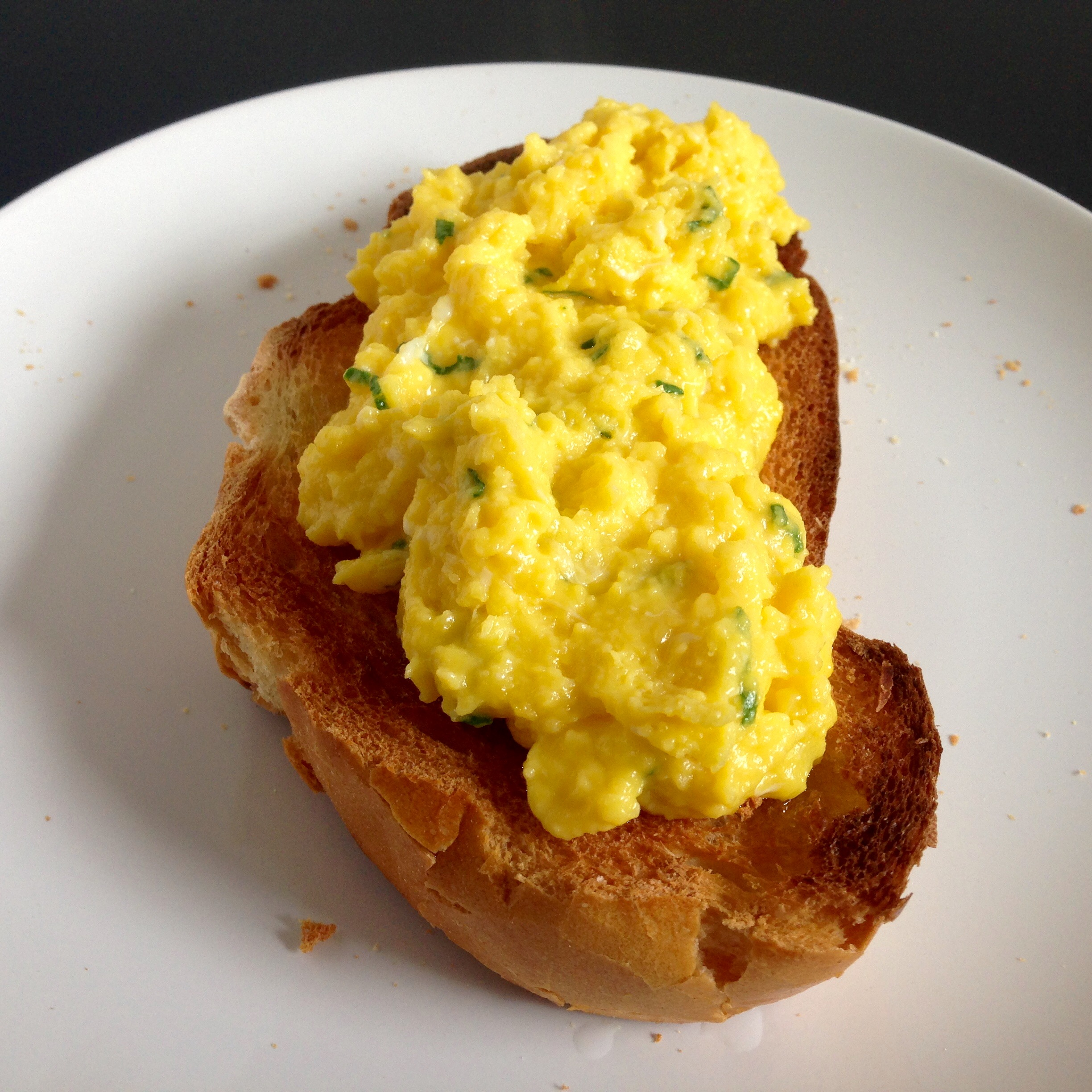 Rührei